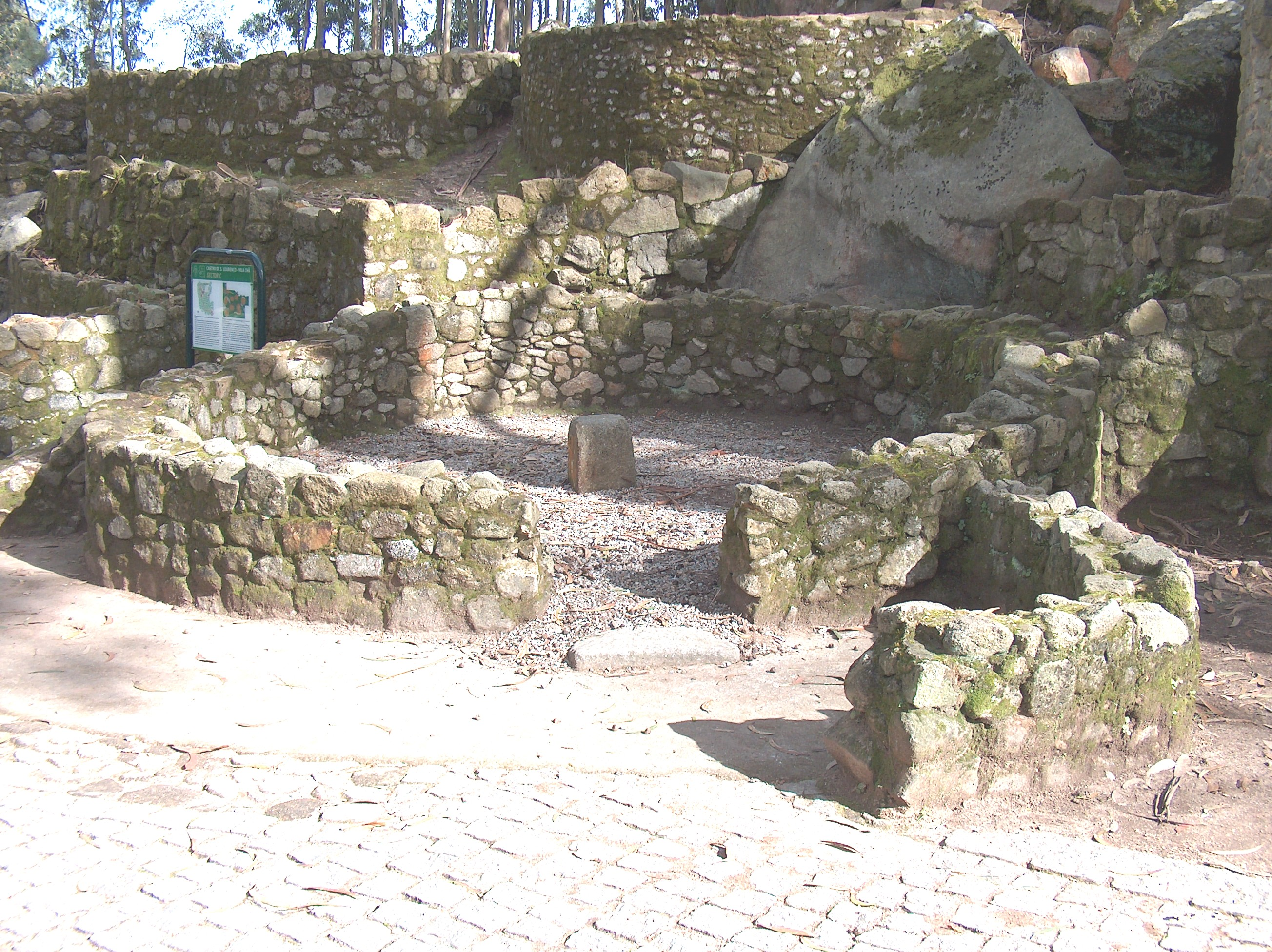 Castro de São Lourenço. Castro de São Lourenço, na freguesia de Vila Chã,concelho de Esposende, distrito de Braga, Portugal.